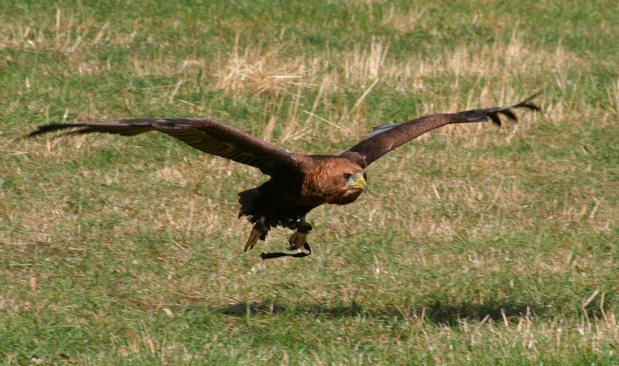 A juvenile domestic Bateleur eagle (Terathopius ecaudatus) in flight.